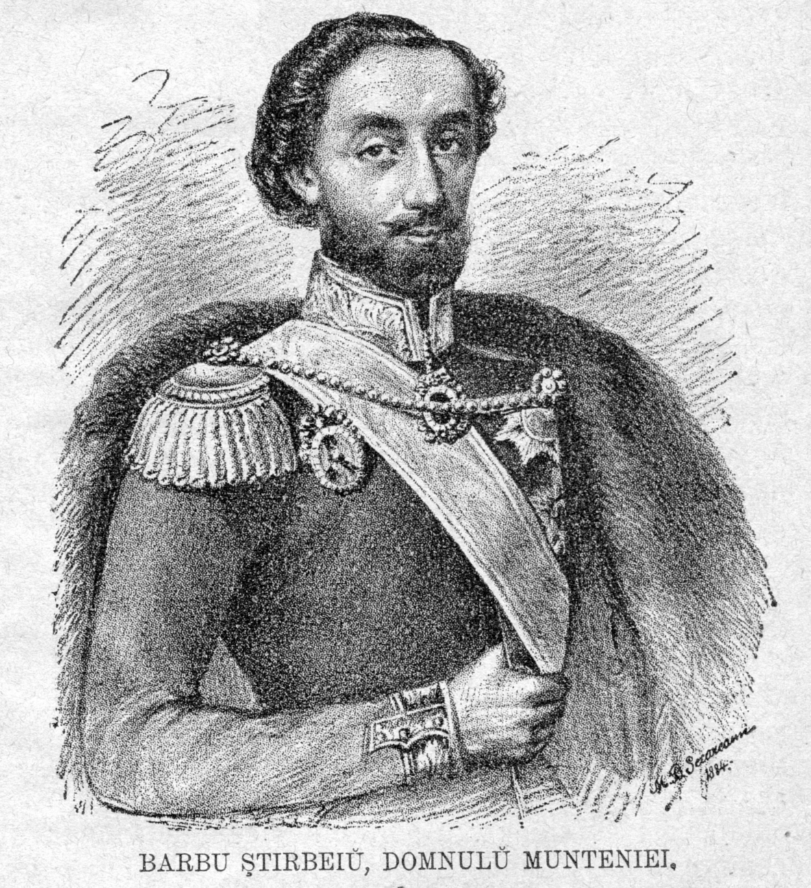 Barby Ştirbey